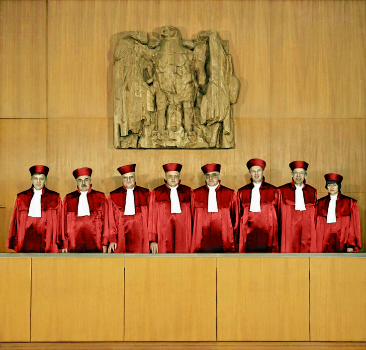 18.12.1989 Bundesverfassungsgericht Karlsruhe I. Senat in neuer Zusammensetzung (ab 1.12.1989) v.li. Dr. Jürgen Kühling, Prof. Dr. Alfred Söllner, Dr. Otto Seidl, Präsident Prof. Dr. Roman Herzog, Prof. Dr. Johann Friedrich Henschel, Prof. Dr. Dieter Grimm, Prof. Dr. Thomas Dieterich, Helga Seibert.